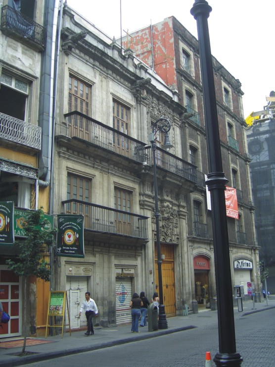 Casa de la Marquesa de Uluapa en la Cd. de México, D.F.